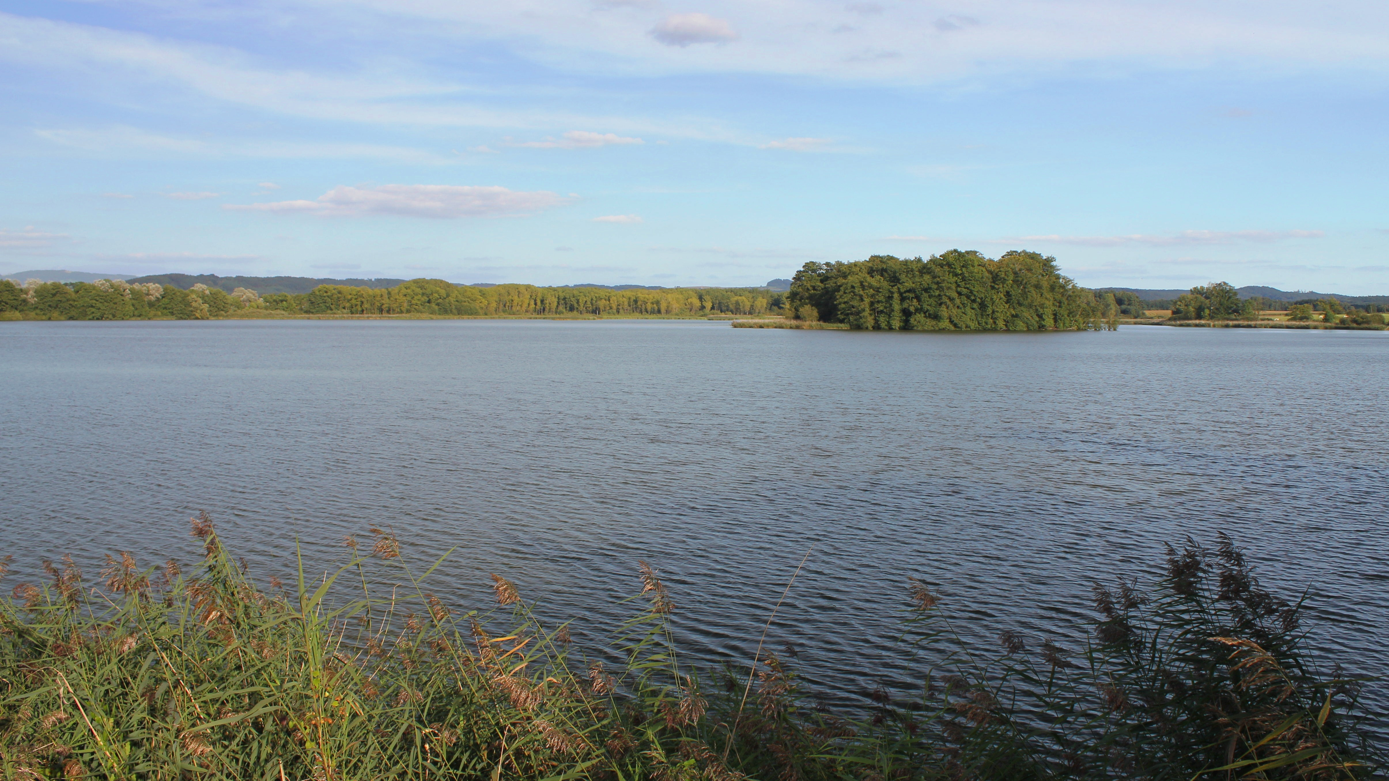 Žabakor